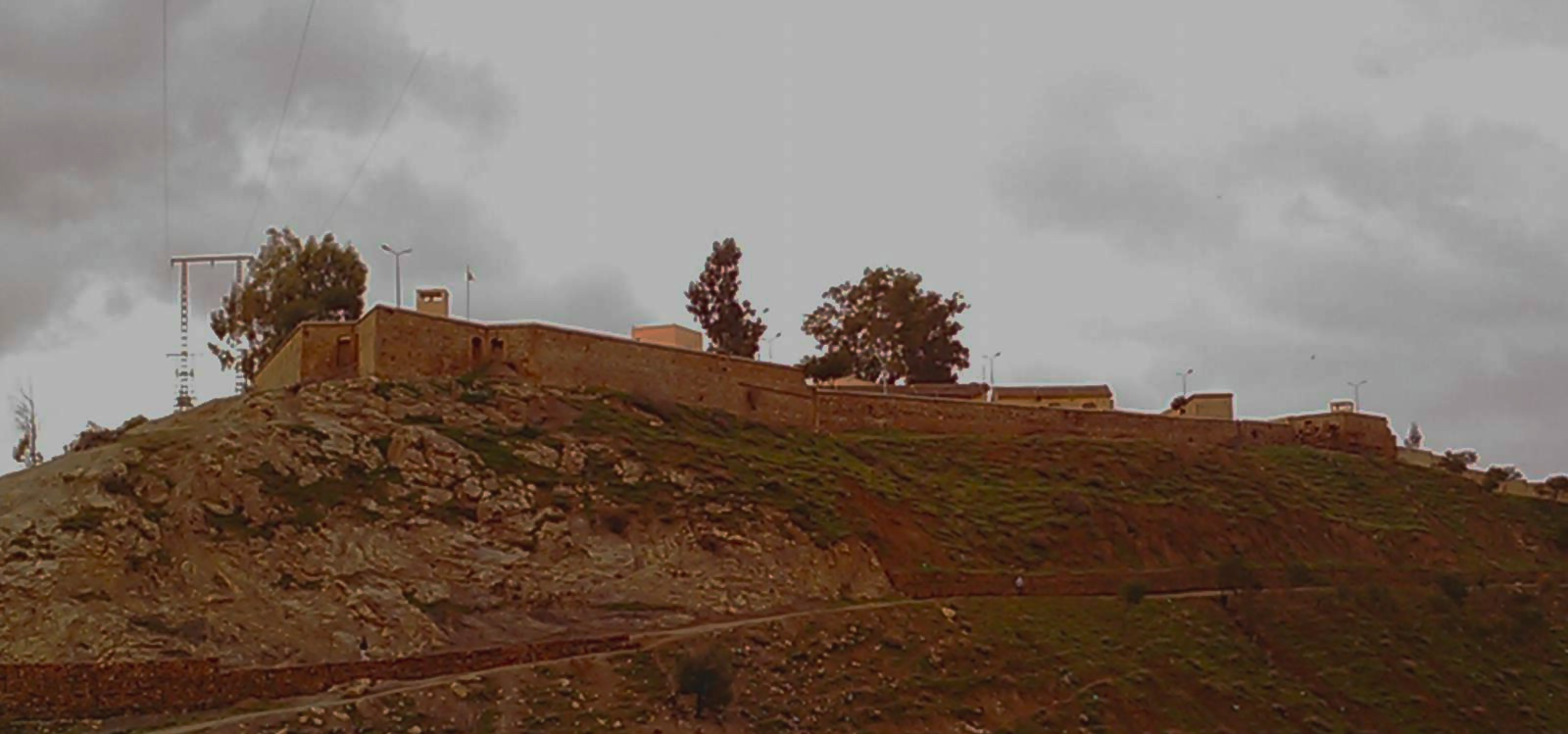 Fort La Redoute - El Bordj (Caserne de l'ANP Ammi Moussa)